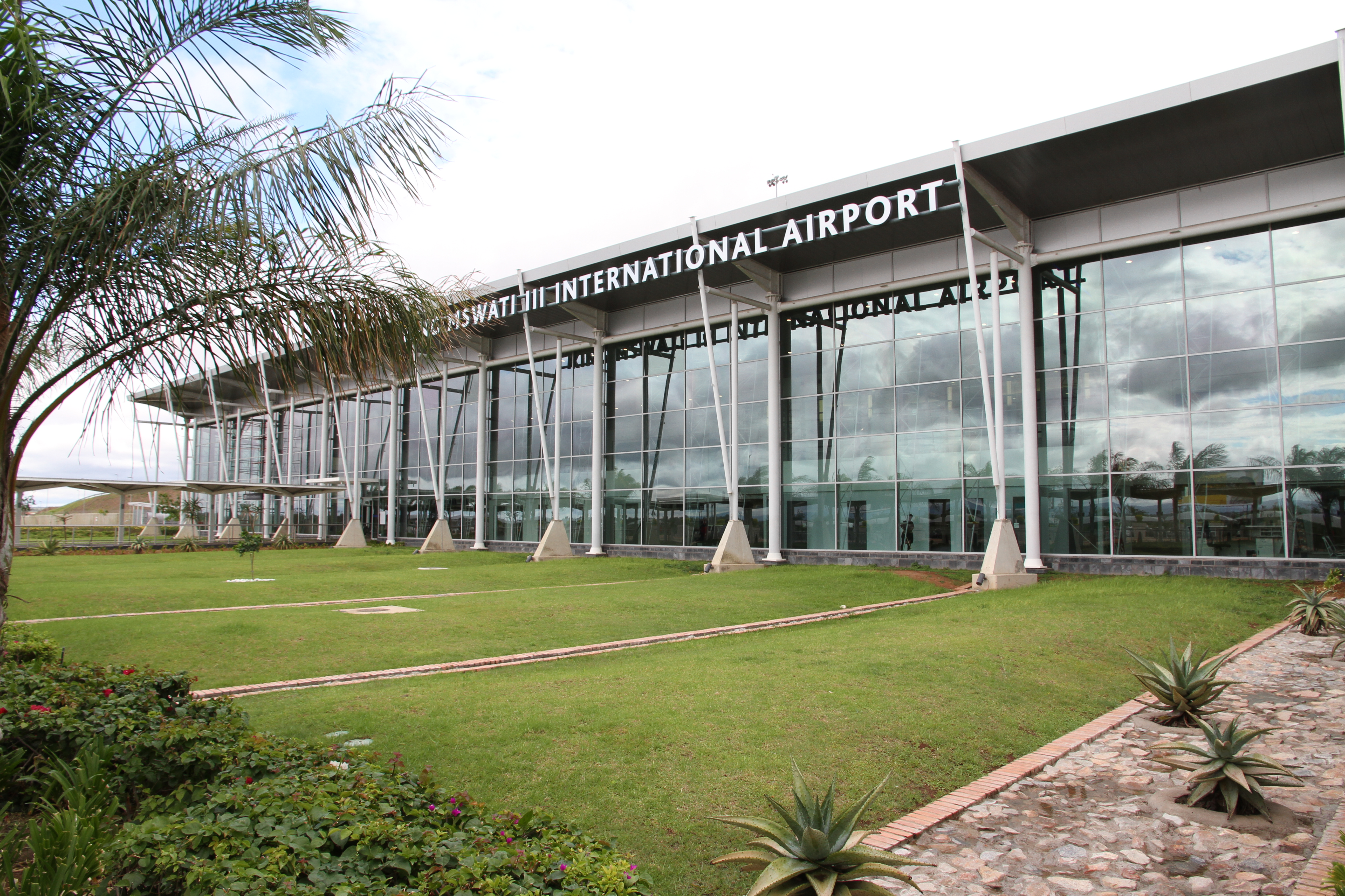 King Mswati III International Airport - Terminal